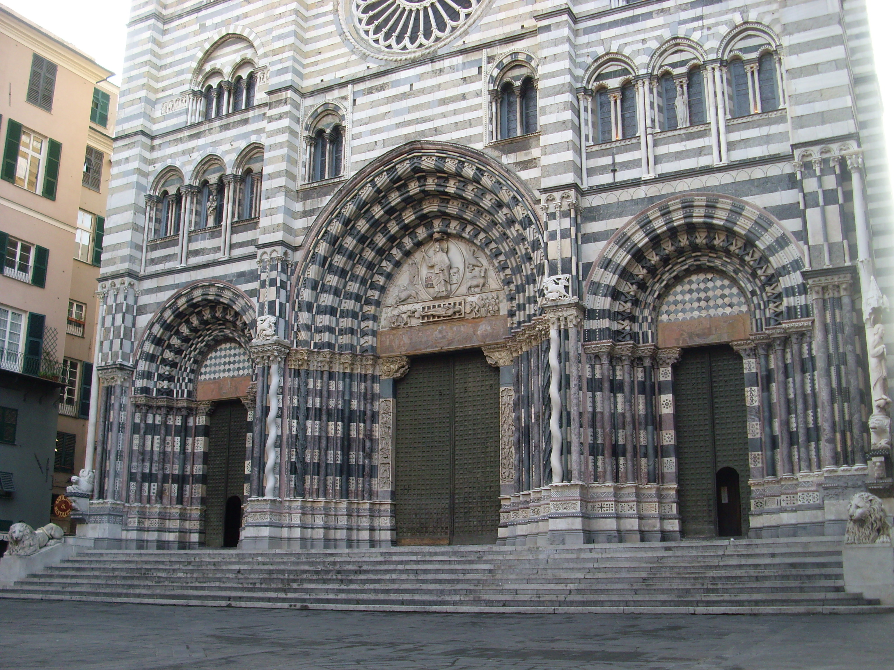 Cattedrale di San Lorenzo, a Genova. Particolare della facciata.